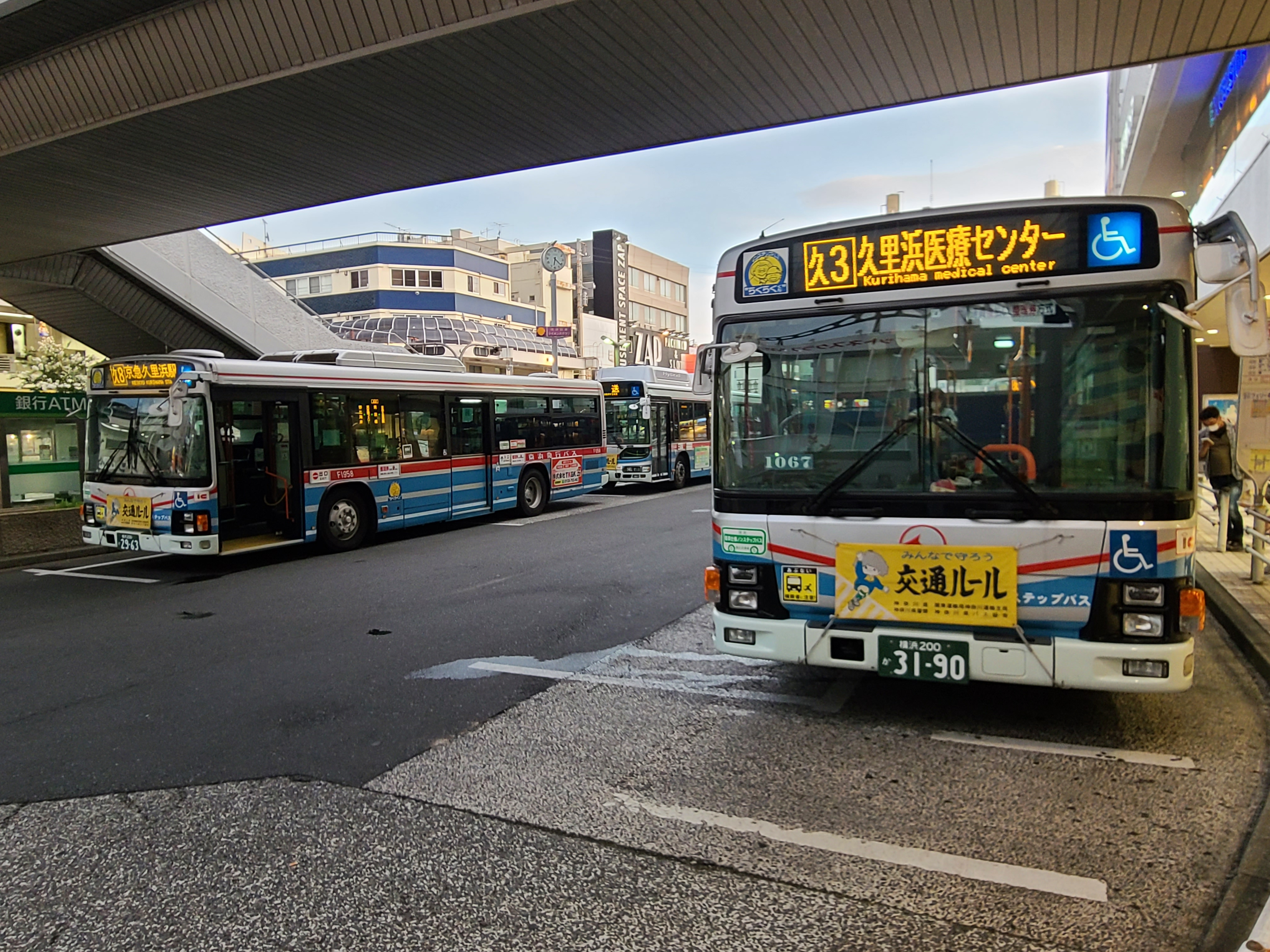 バスターミナルです。